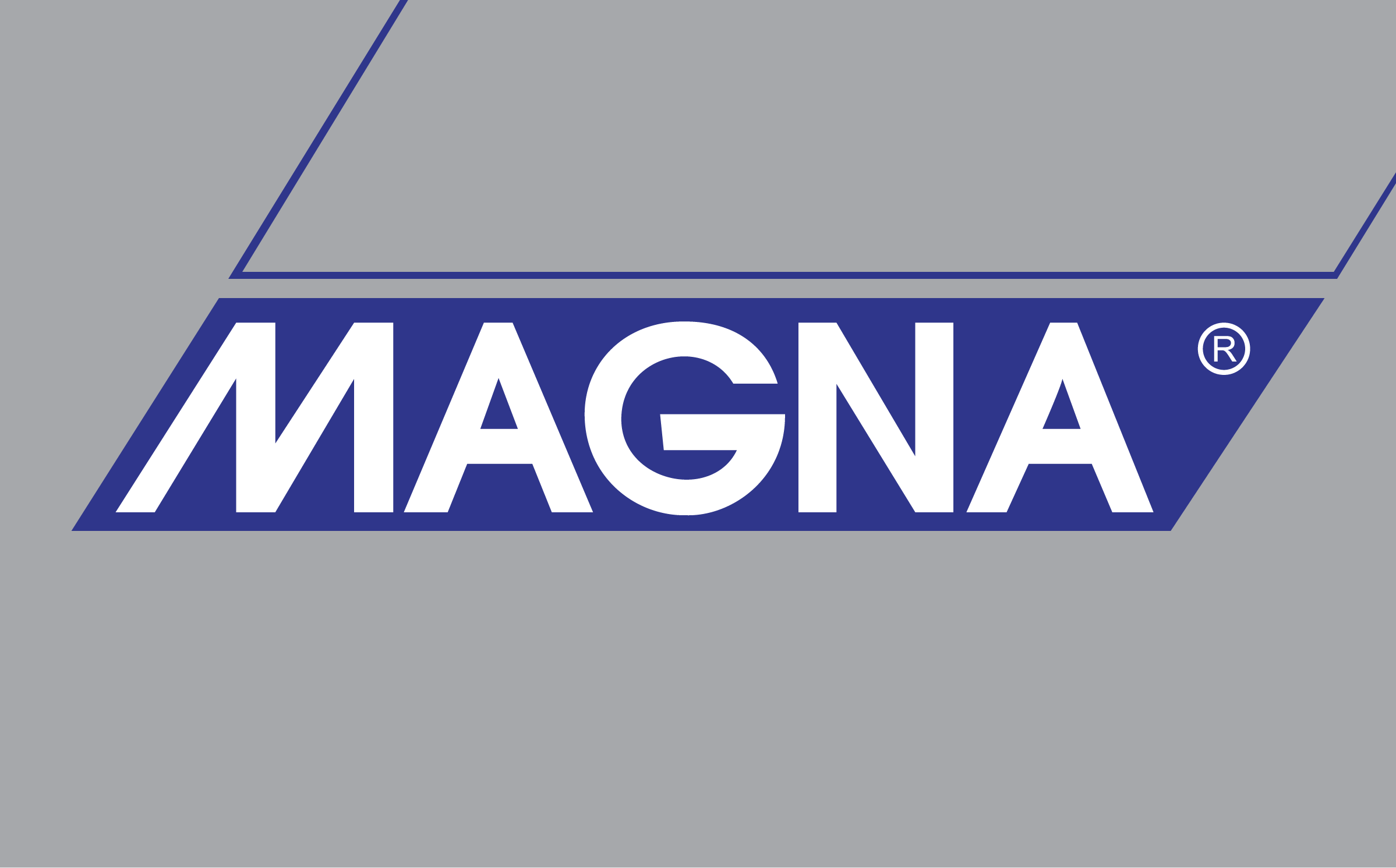 Emblema de la tarjeta de crédito Magna.